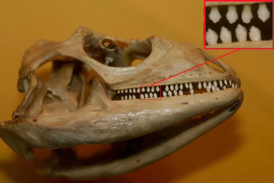 Green Iguana skull (Iguana iguana)